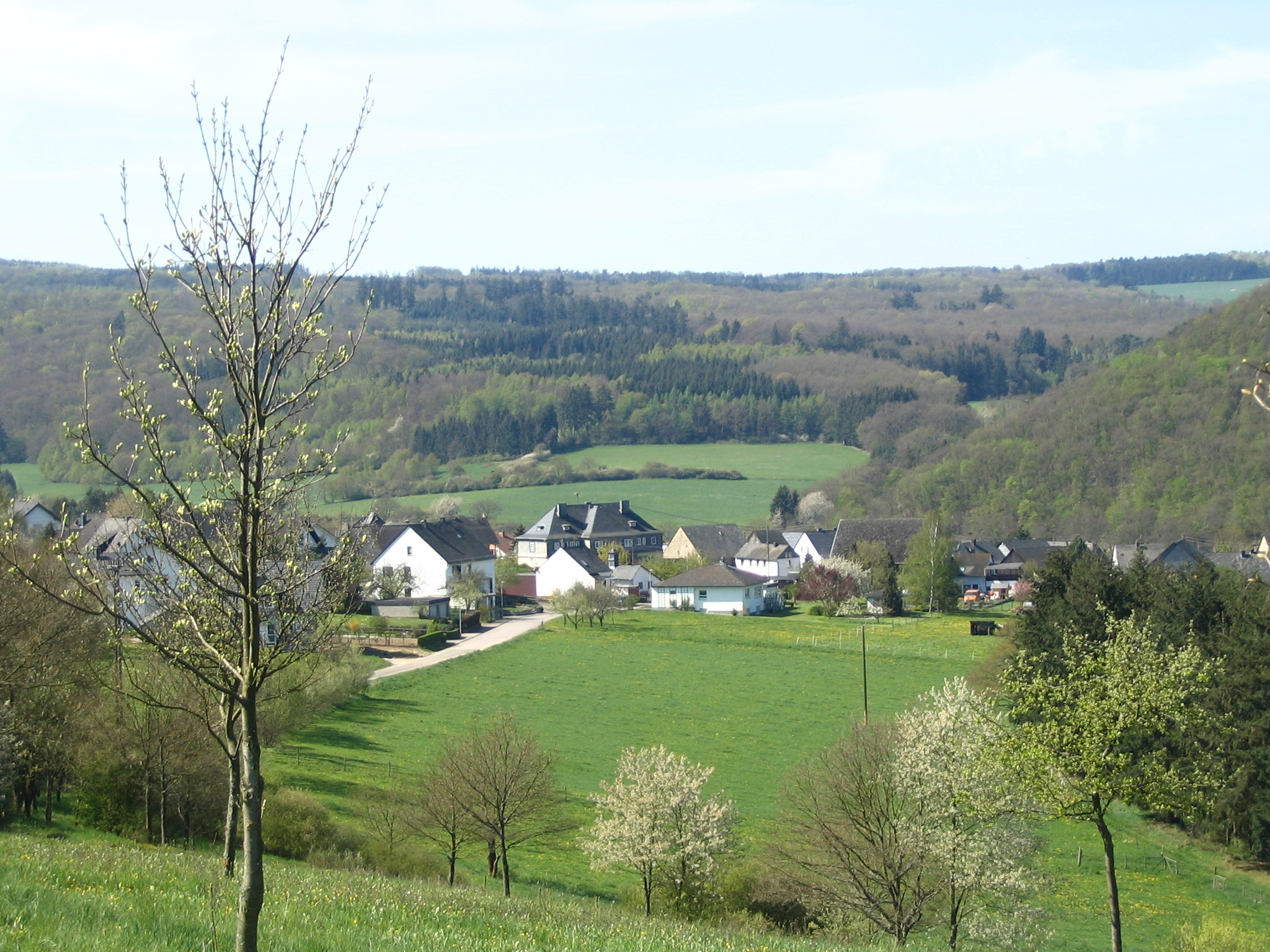 Blick von Osten auf Gehlweiler, Rhein-Hunsrück-Kreis, Rheinland-Pfalz